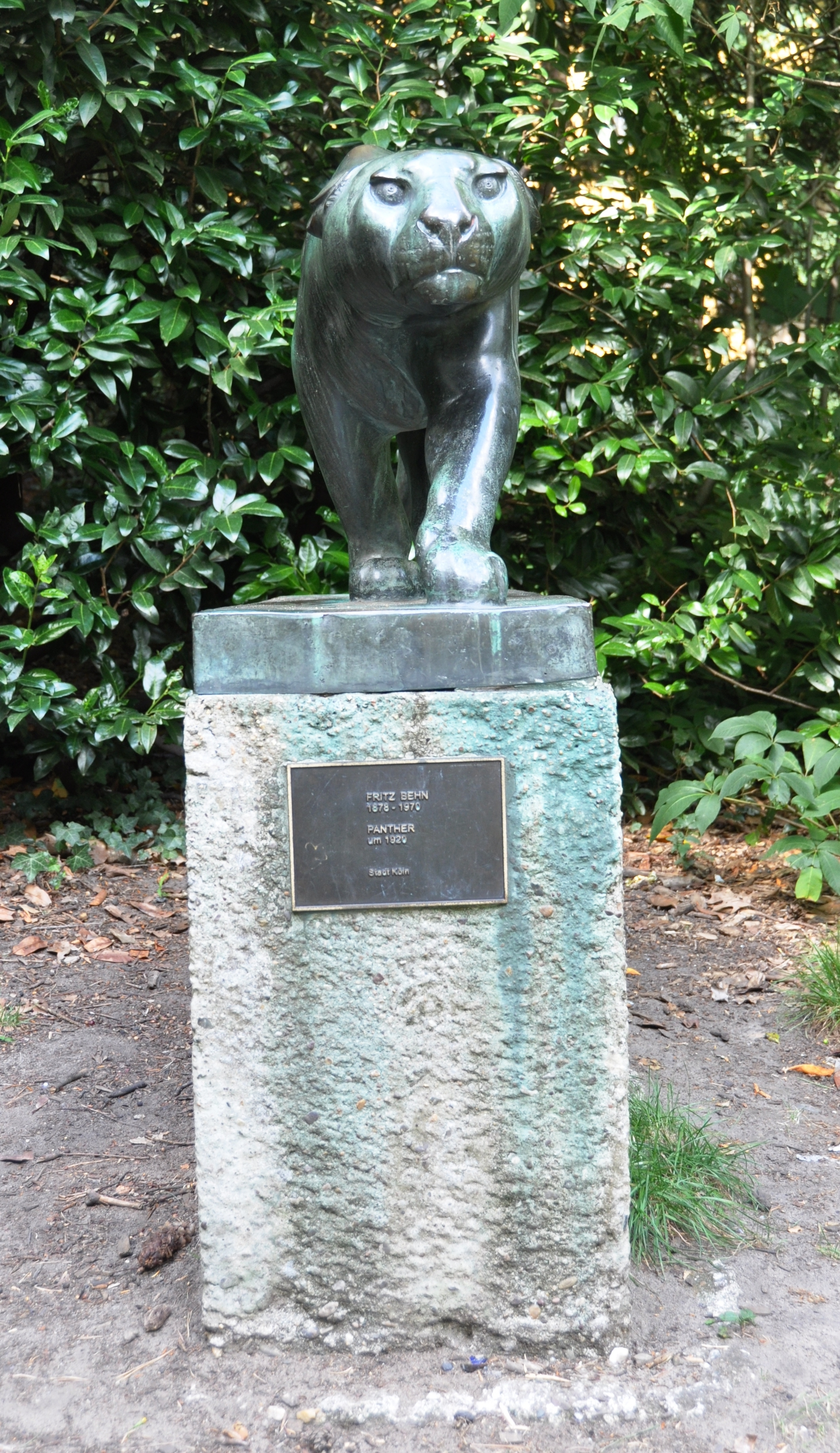 Panther-Skulptur im Kölner Südpark